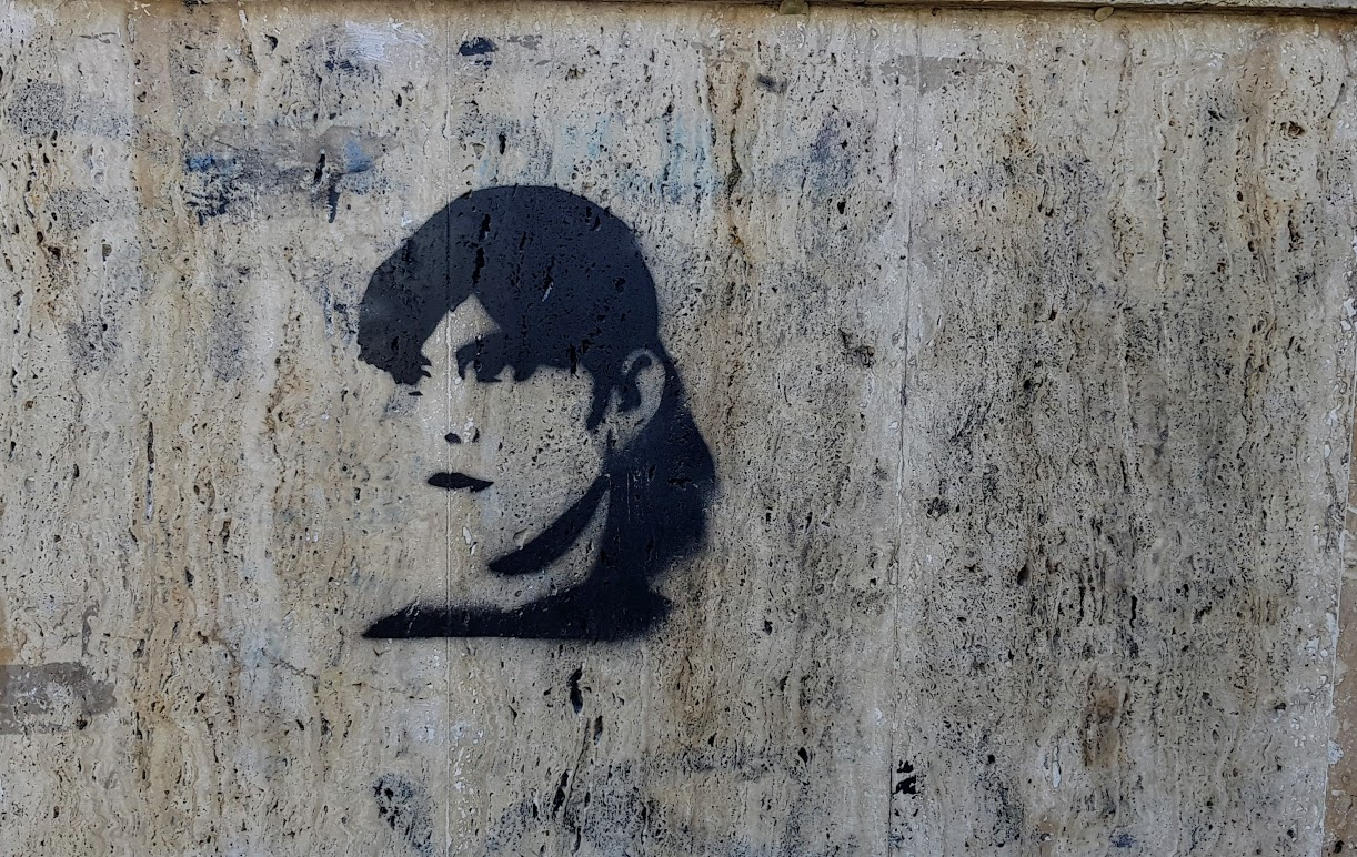 Laura Codruța Kövesi - graffiti București 2019, Metrou Politehnică